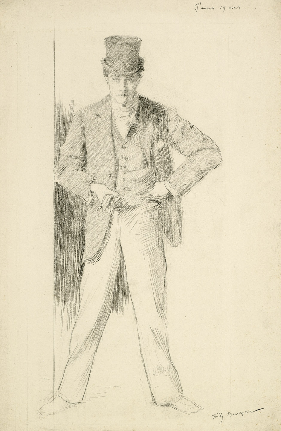 Fritz Burger: Selbstbildnis im Alter von 19 Jahren. Schwarze Kreide auf festem Karton. 48 x 31,5 cm. Signiert und eigenhändig bezeichnet "J'avais 19 ans ...".